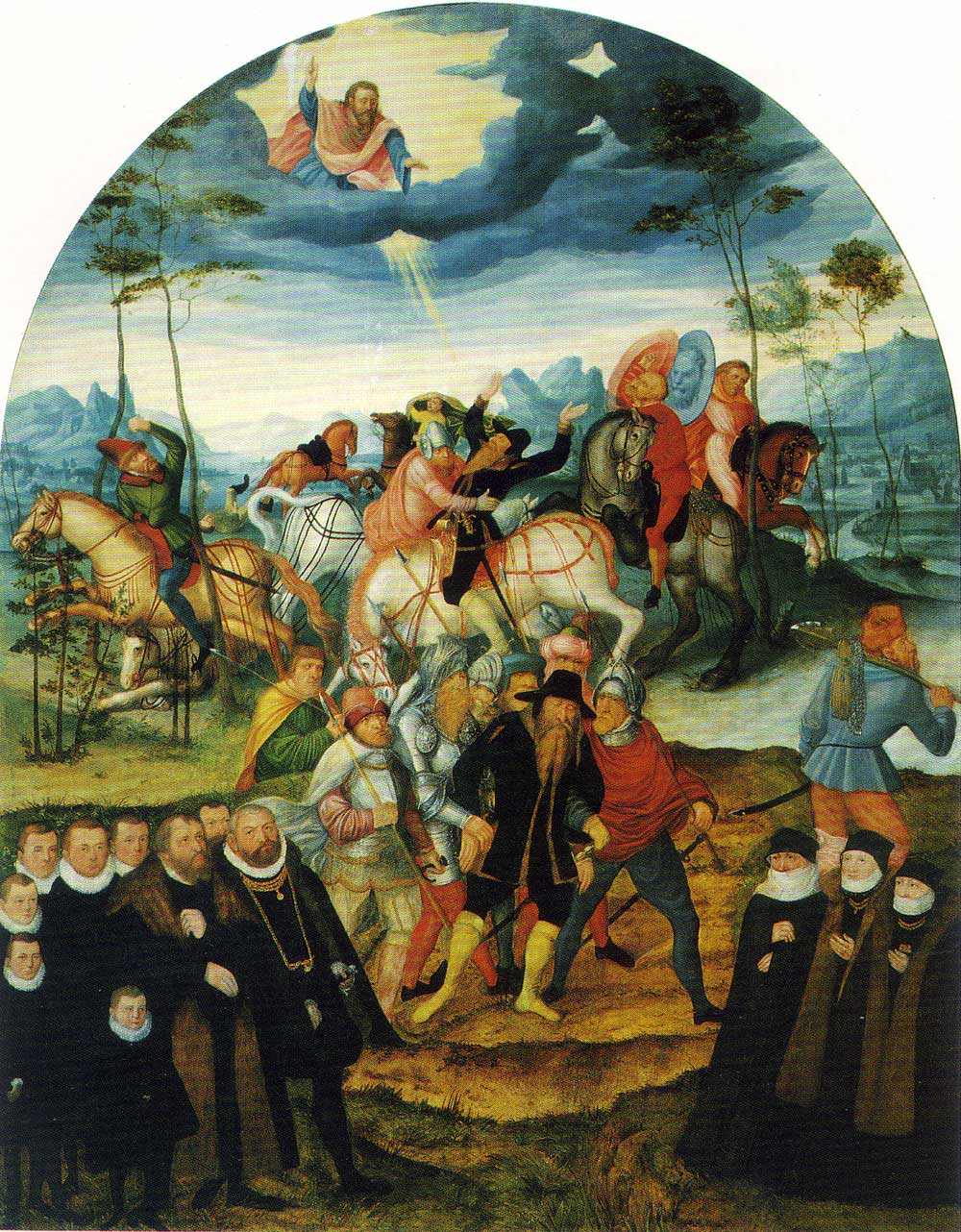 Blendung des Paulus, Epitaph Veit Winsheim (1501-1570)